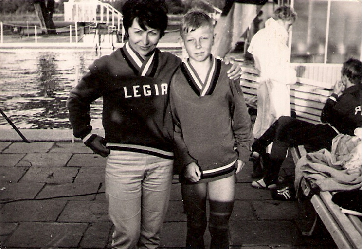 Halina Chrząszcz-Bartkowiak na warszawskim basenie Legii.